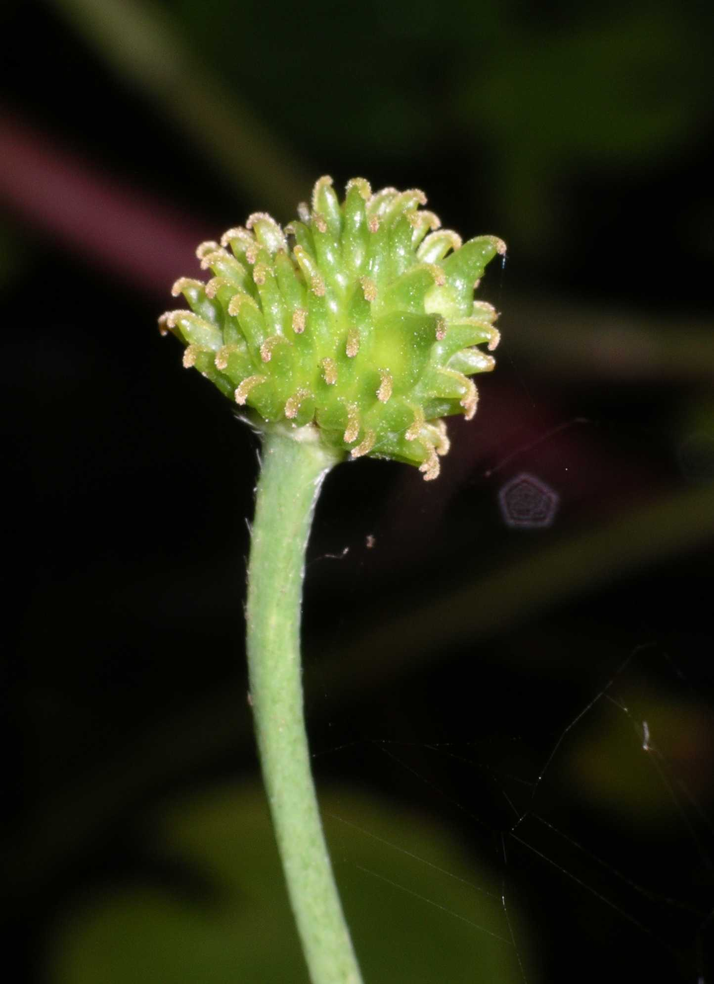 Runuculus seed head